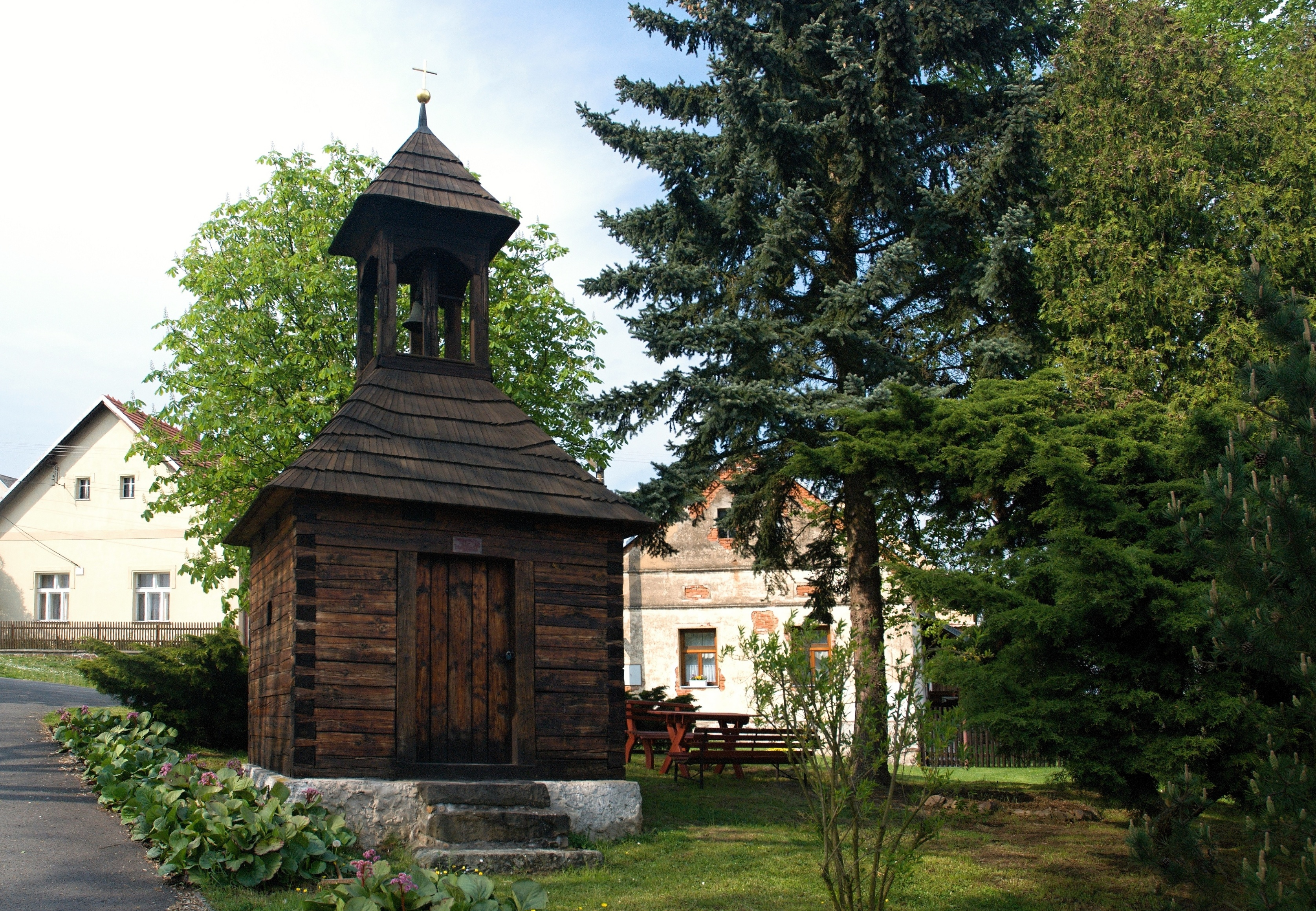 Ostrovec, kaplička na návsi